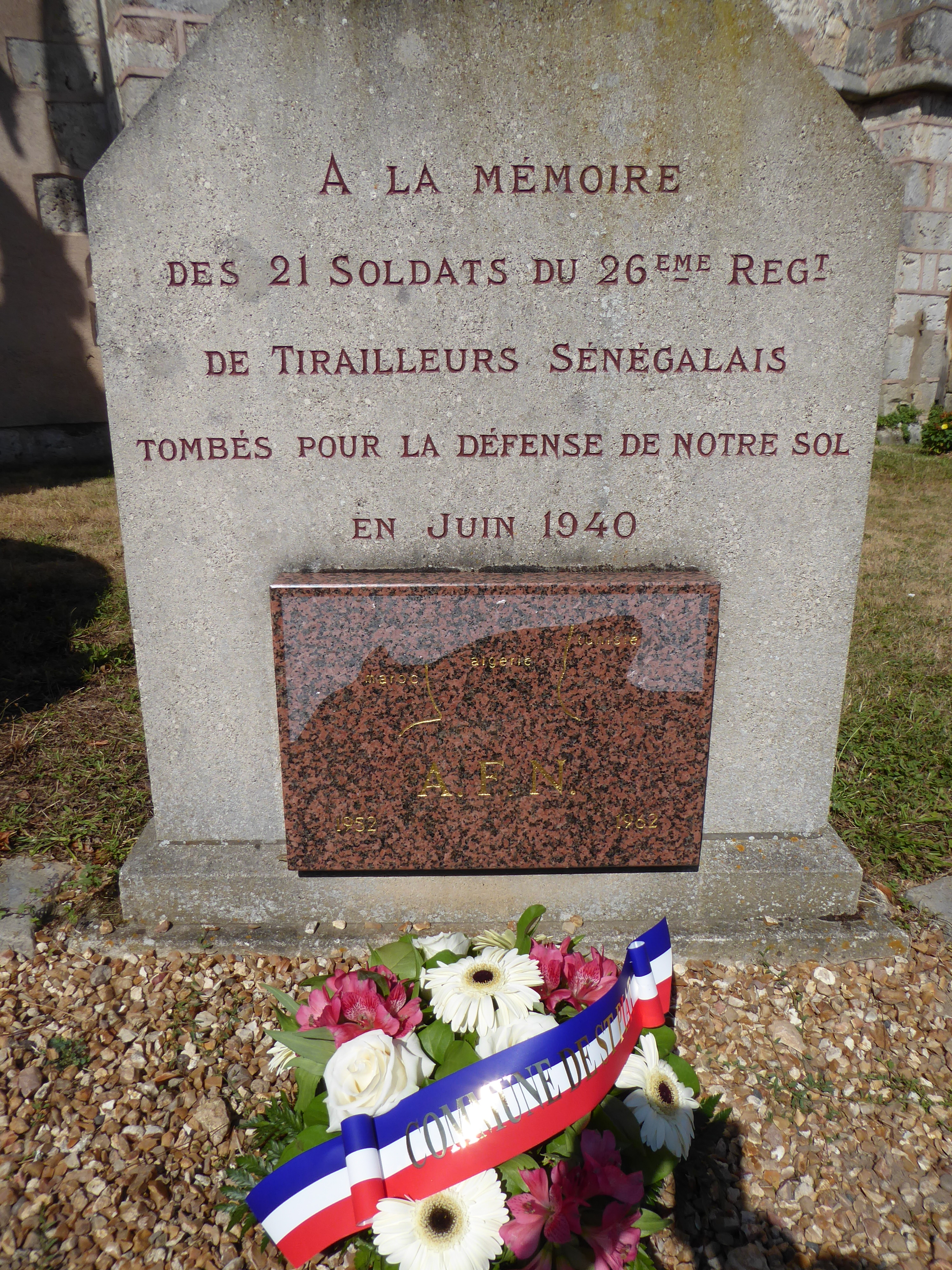 Stèle du monument aux morts "A la mémoire des 21 soldats du 26ème régiment de tirailleurs sénégalais tombés pour la défense de notre sol en juin 1940", Saint-Piat, Eure-et-Loir, France.